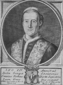 Pope Leo XII